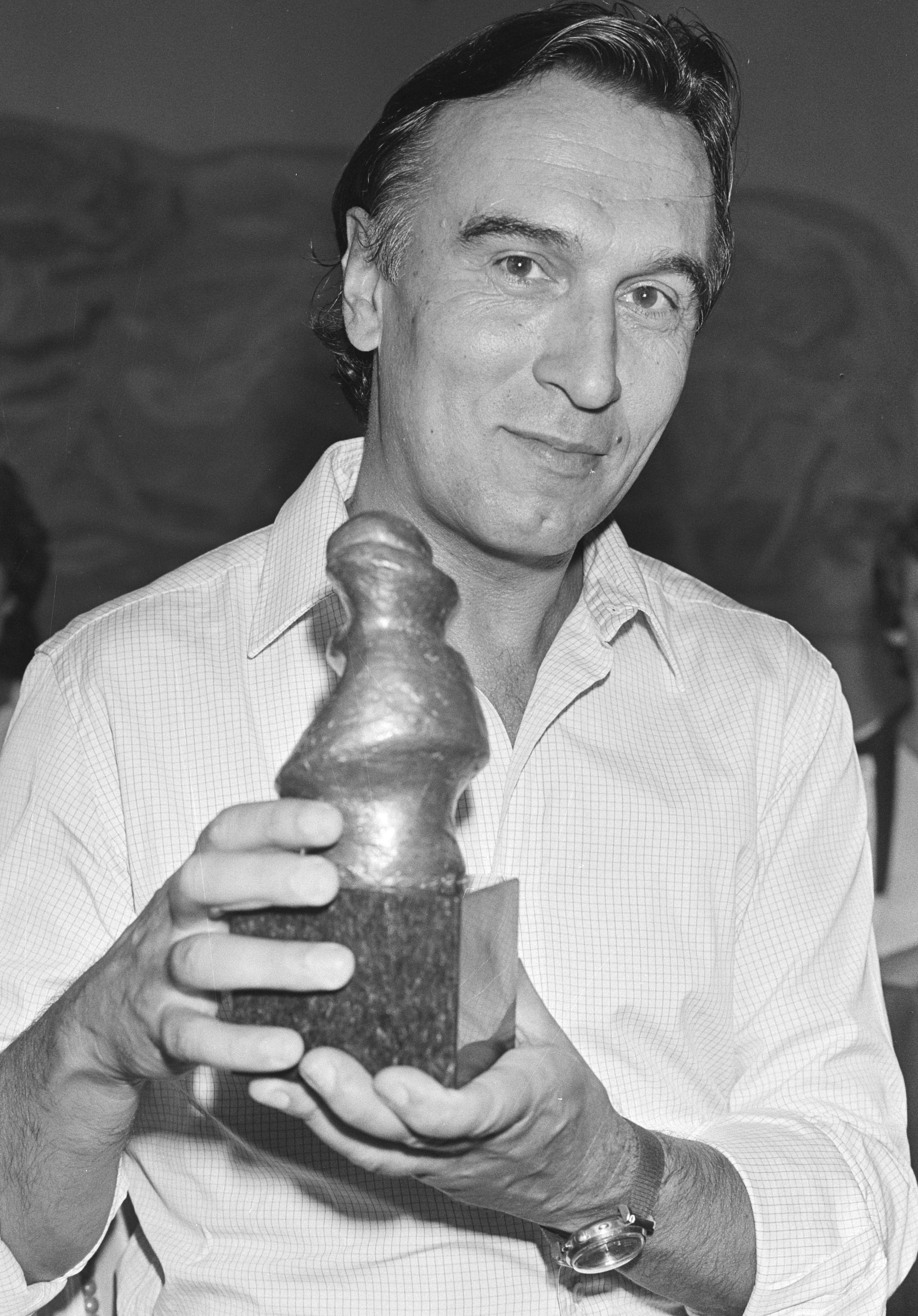 Collectie / Archief : Fotocollectie Anefo Reportage / Serie : [ onbekend ] Beschrijving : Claudio Abbado (dirigent) krijgt AVRO's publieksprijs Klassiek 81; Claudio Abbado met trofee Datum : 12 augustus 1982 Trefwoorden : dirigenten, trofeeën Persoonsnaam : Abbado, Claudio Instellingsnaam : AVRO Fotograaf : Croes, Rob C. / Anefo Auteursrechthebbende : Nationaal Archief Materiaalsoort : Negatief (zwart/wit) Nummer archiefinventaris : bekijk toegang 2.24.01.05 Bestanddeelnummer : 932-2754